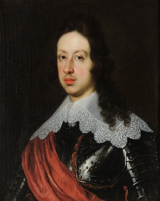 Sohn des Großherzogs Cosimo II. von Toskana und der Maria Magdalena von Österreich); 1614-1634.Portrait-Gemälde, undat.